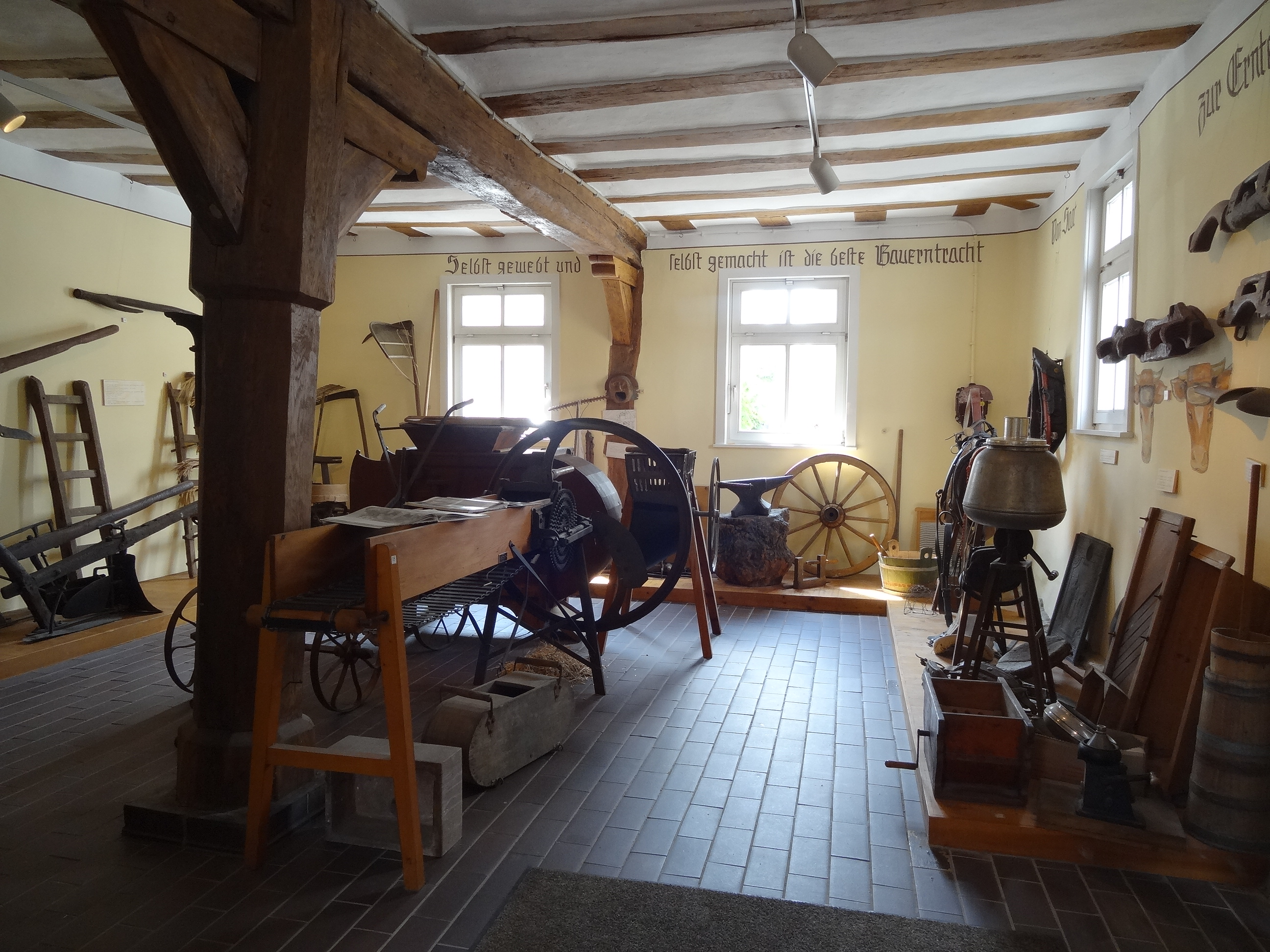 Hüttenberger Heimatmuseum, Erdgeschoss